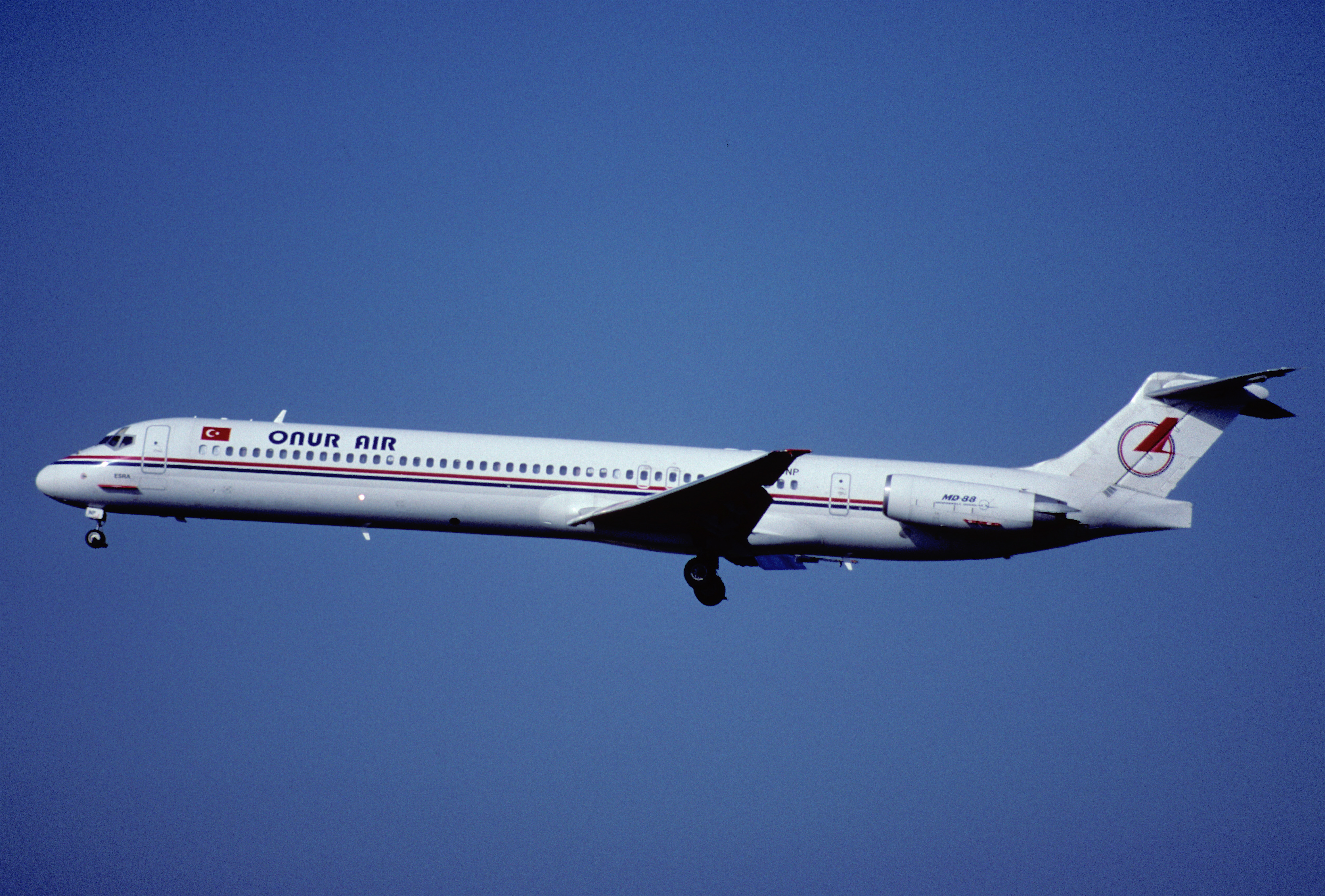 135bg - Onur Air MD-88; TC-ONP@ZRH;30.06.2001